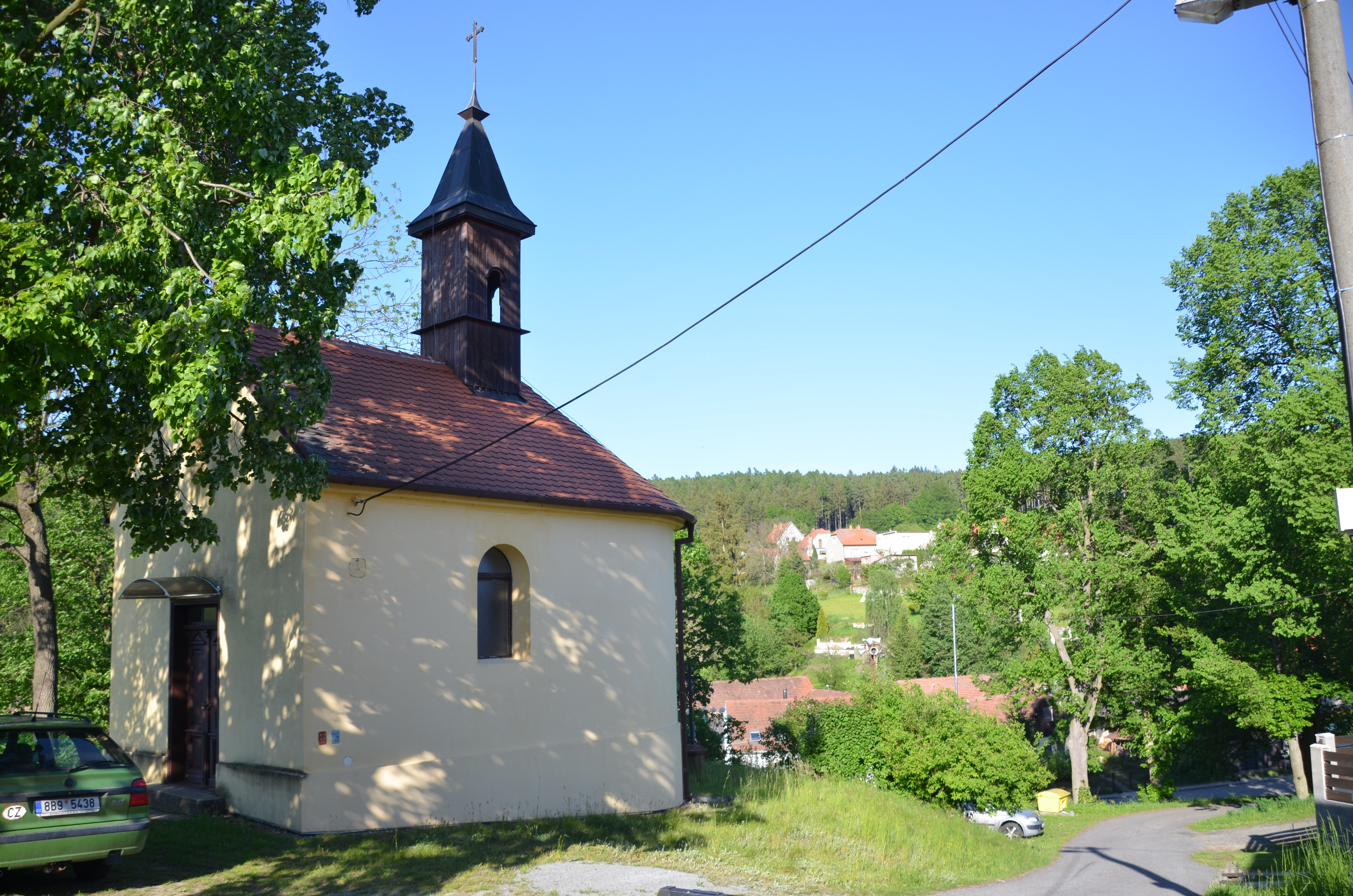 Kaple Nanebevzetí Panny Marie v Holešíně